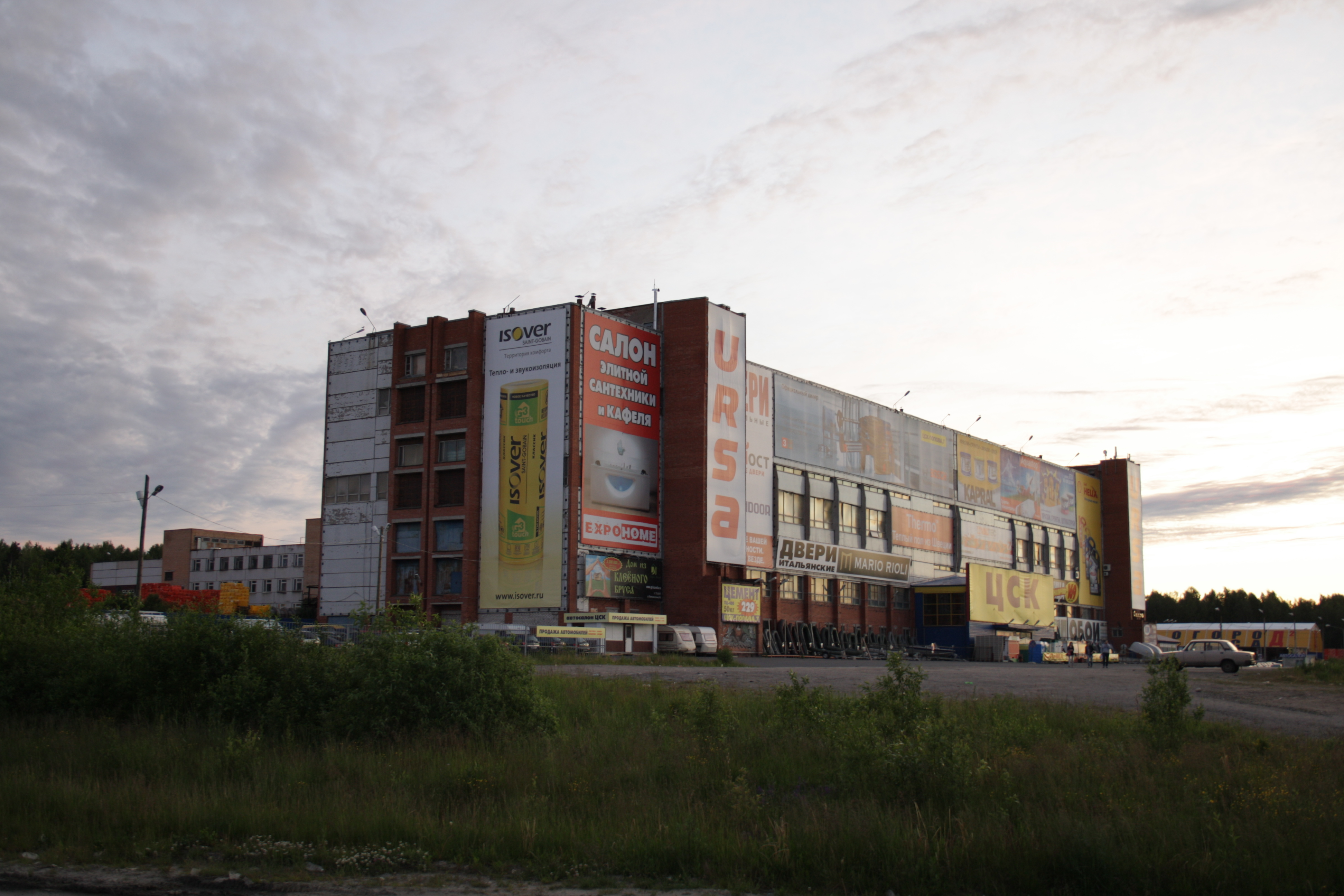 Завод "Онего" и гипермаркет "ЦСК"